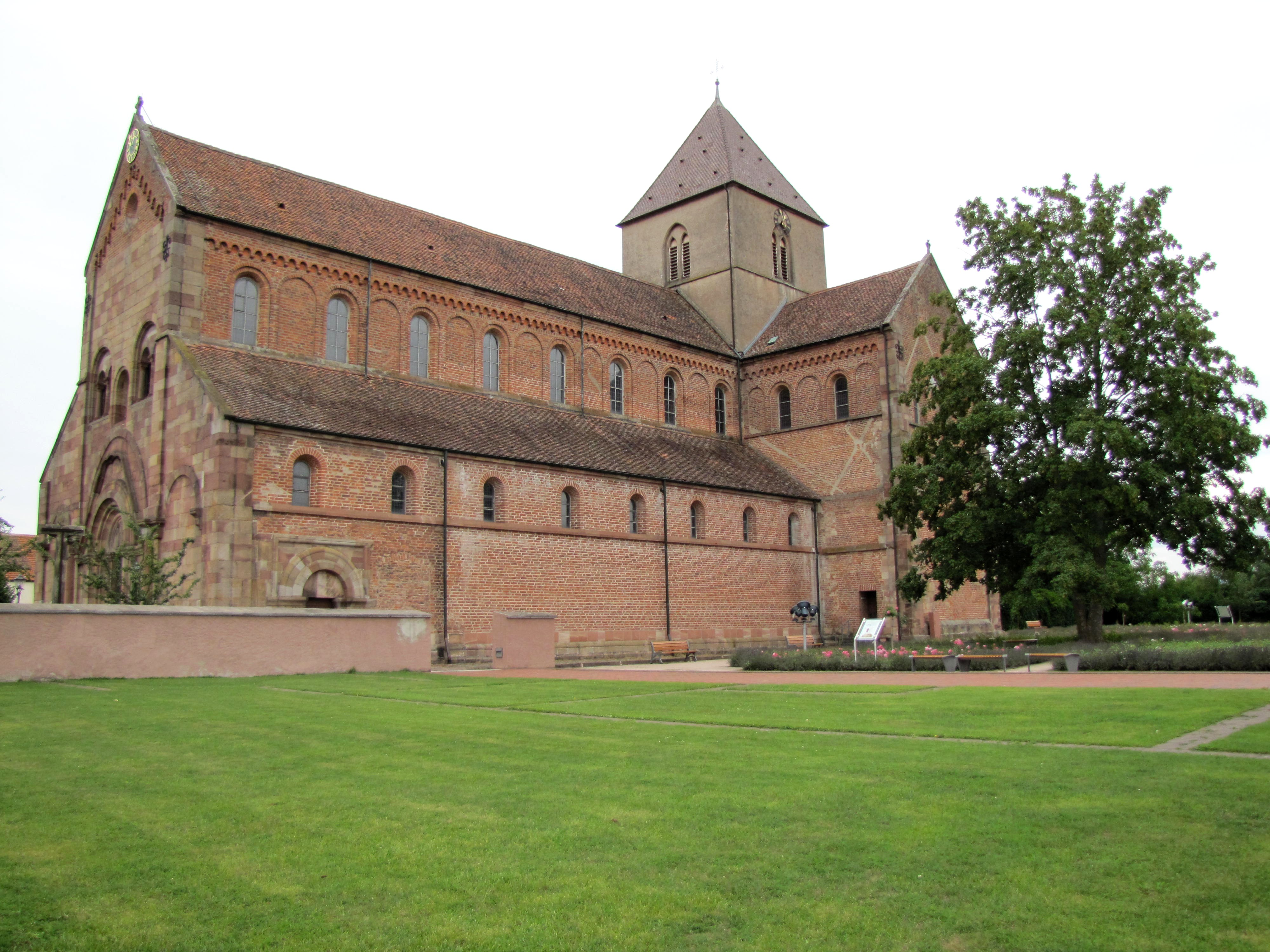 Baden-Württemberg, Rheinmünster, Klosterkirche Schwarzach, Ansicht von Süden